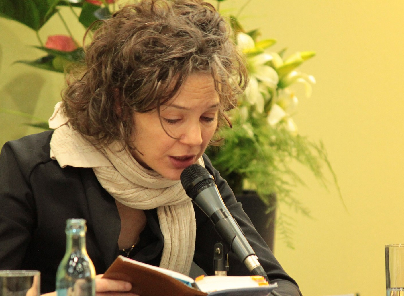 Schriftstellerin Melinda Nadj Abonji auf der Leipziger Buchmesse 2011. Hornjoserbsce: Spisowaćelka Melinda Nadj Abonji na Lipšćanskich knižnych wulkowikach.